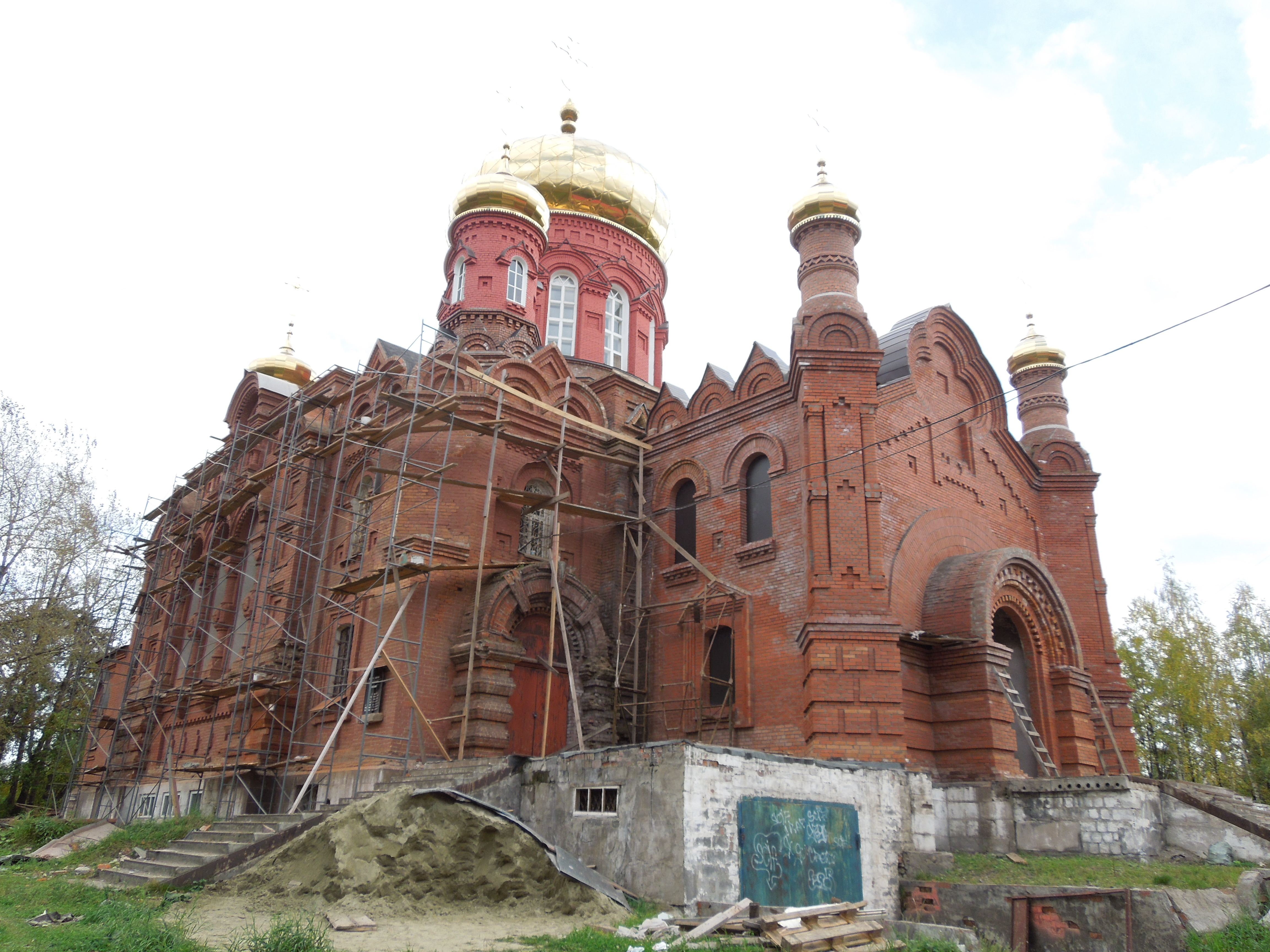 Собор Крестовоздвиженский (Свердловская область, Нижний Тагил, Красногвардейская улица, 55)